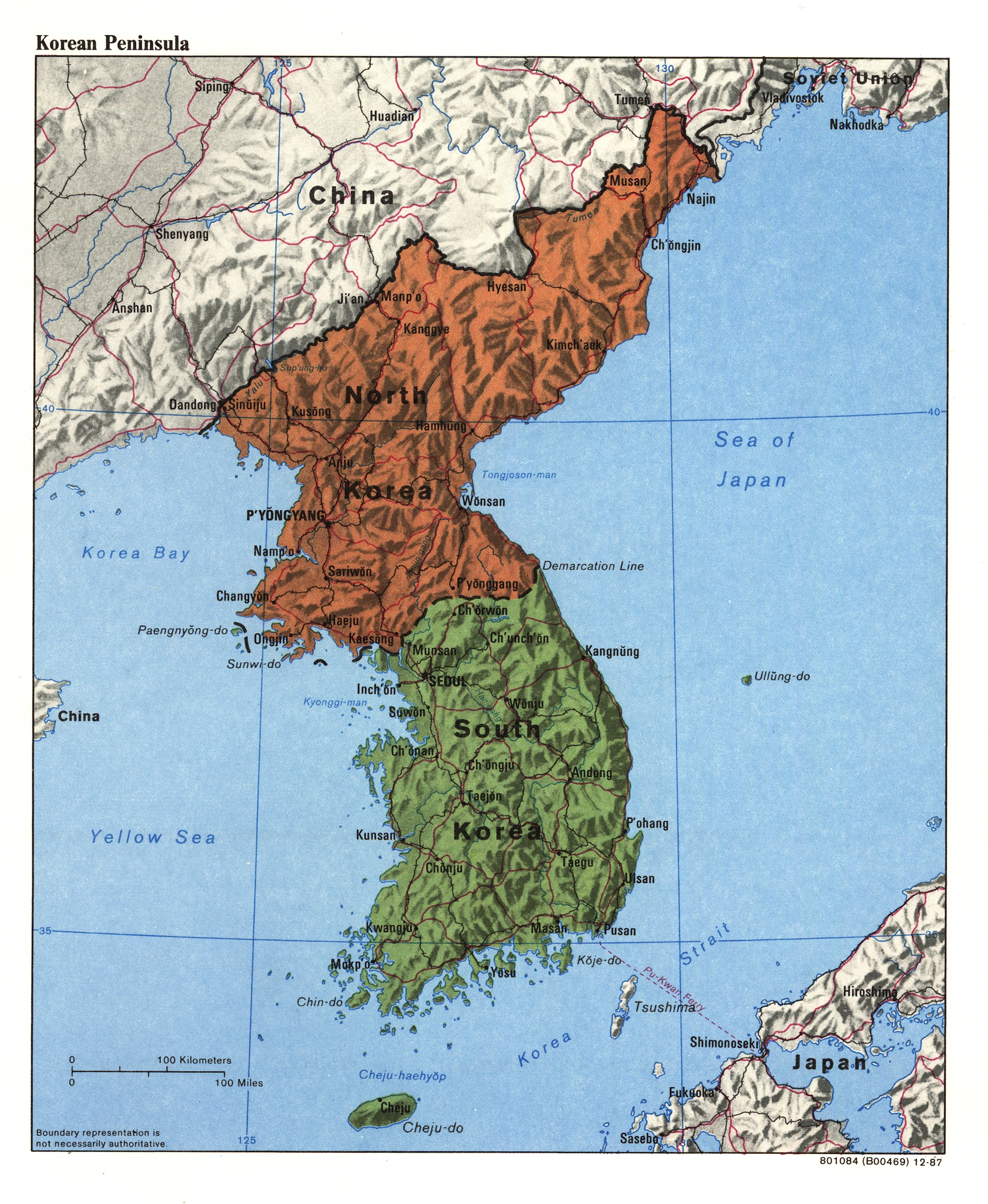 1987 Korean Peninsula